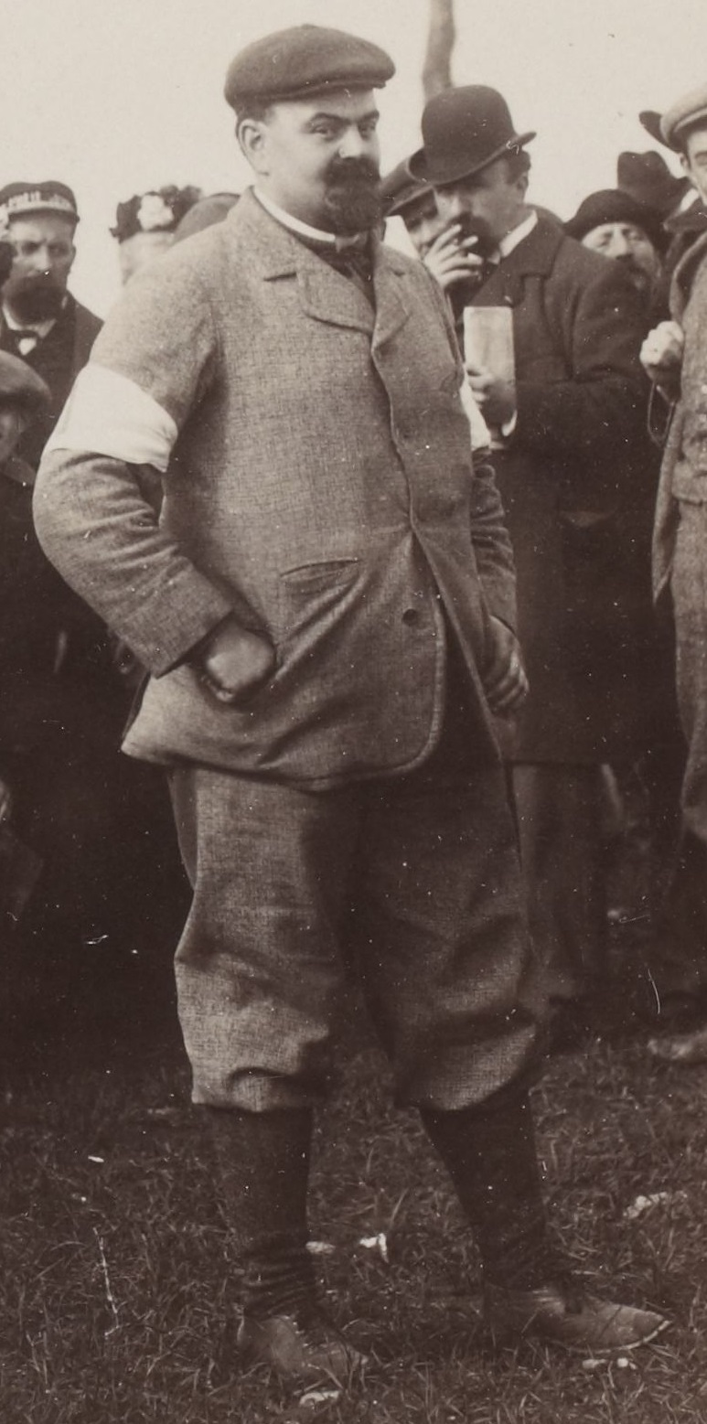 [Collection Jules Beau. Photographie sportive] : T. 6. Année 1898 / Jules Beau : F. 20. Wilfrid, voiturette ; Léon Bollée, 28 avril 1898, Critérium des Motocycles